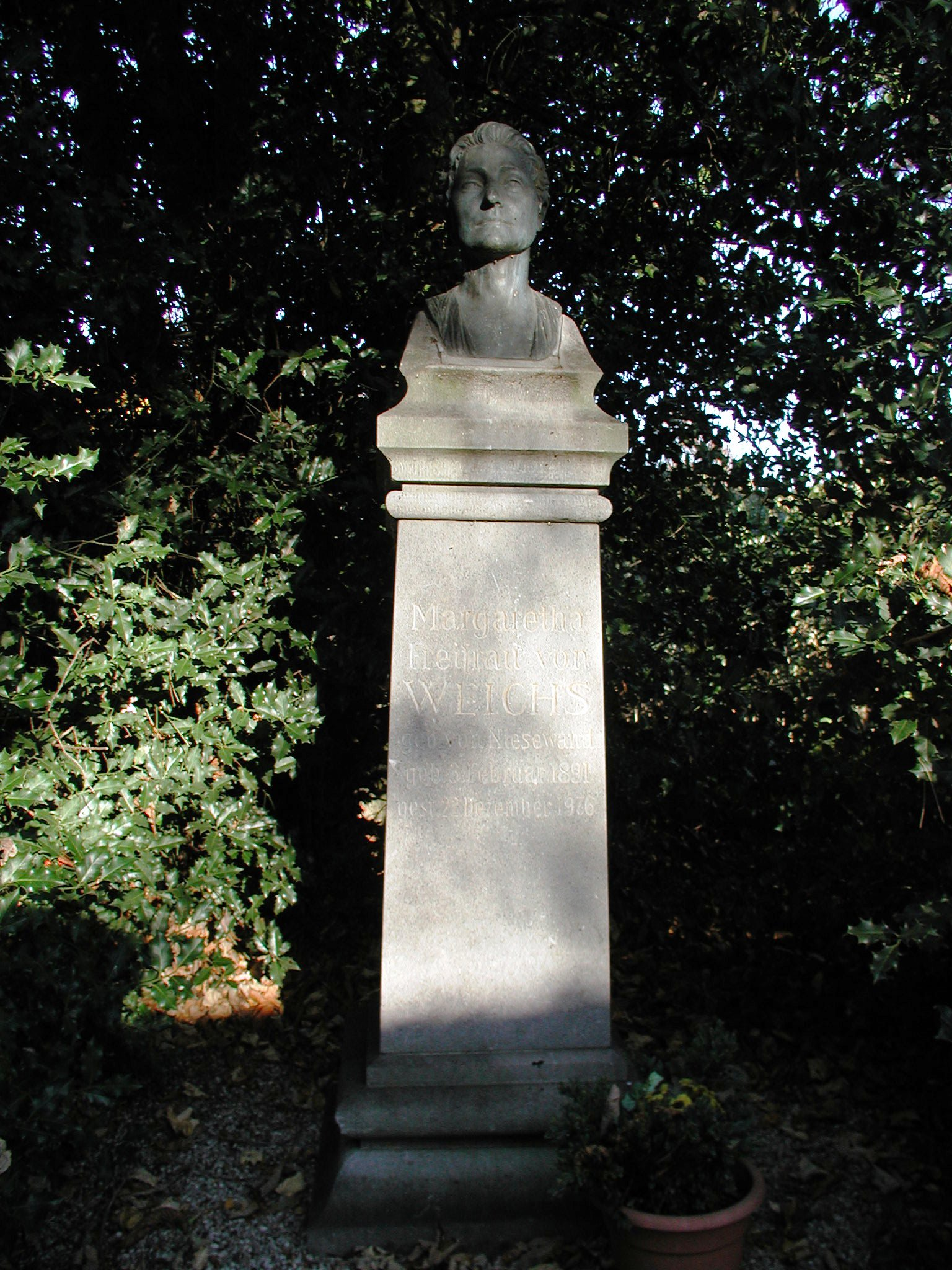 Bornheim-Rösberg, Burg Rösberg